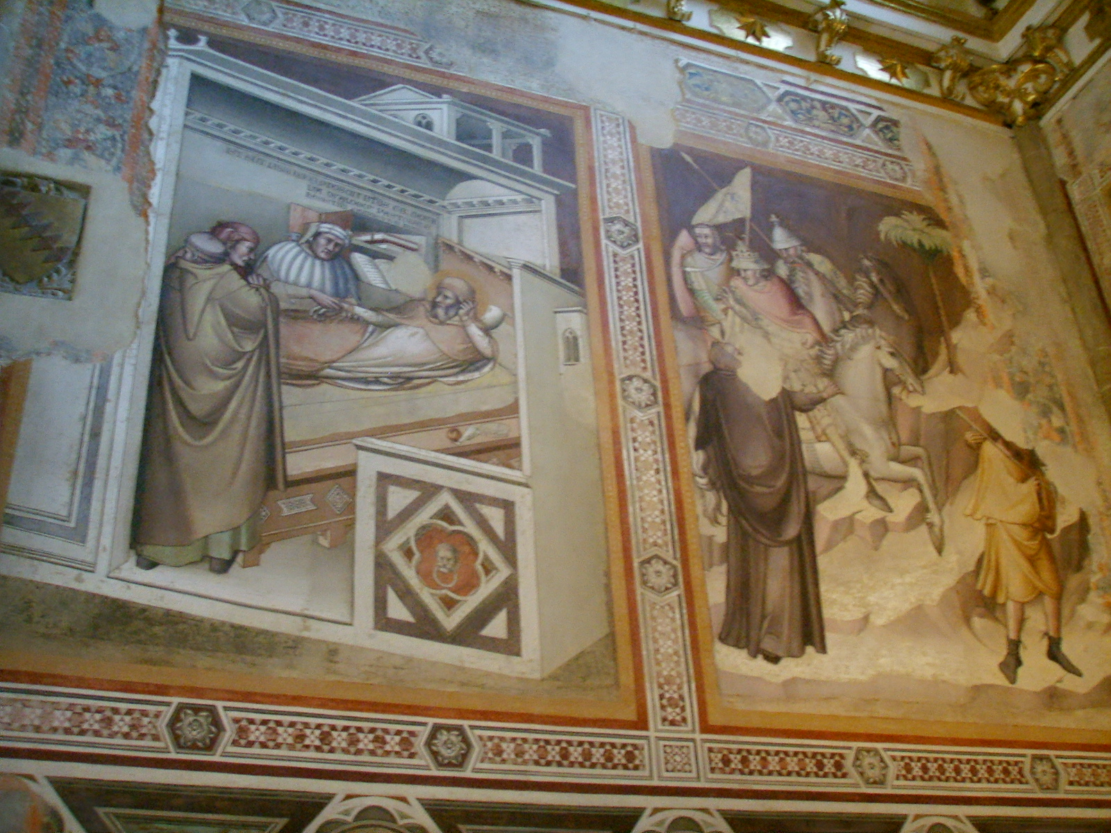 Santa Maria Novella church, frescoed chapel A, in Florence, Italy